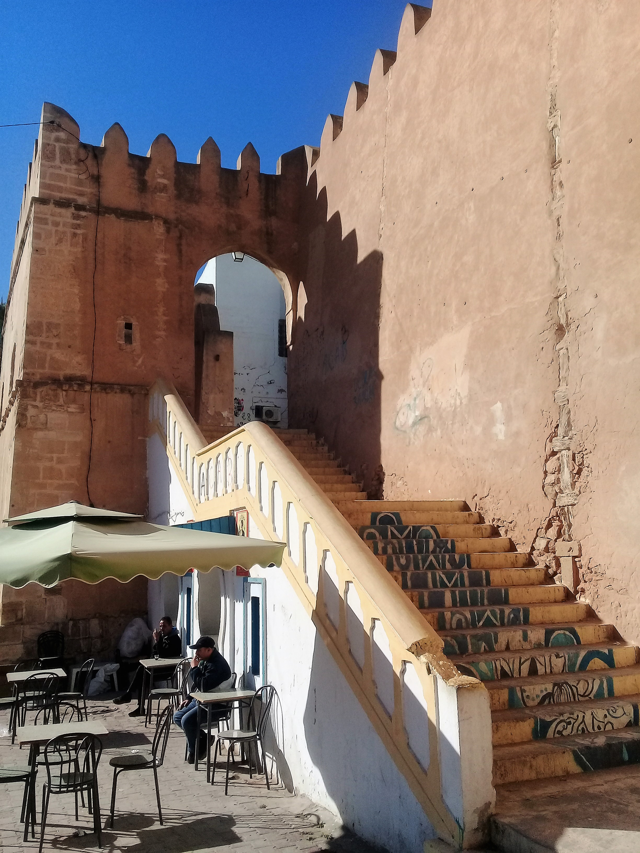 Bab Borj Ennar - Vue d'ensemble